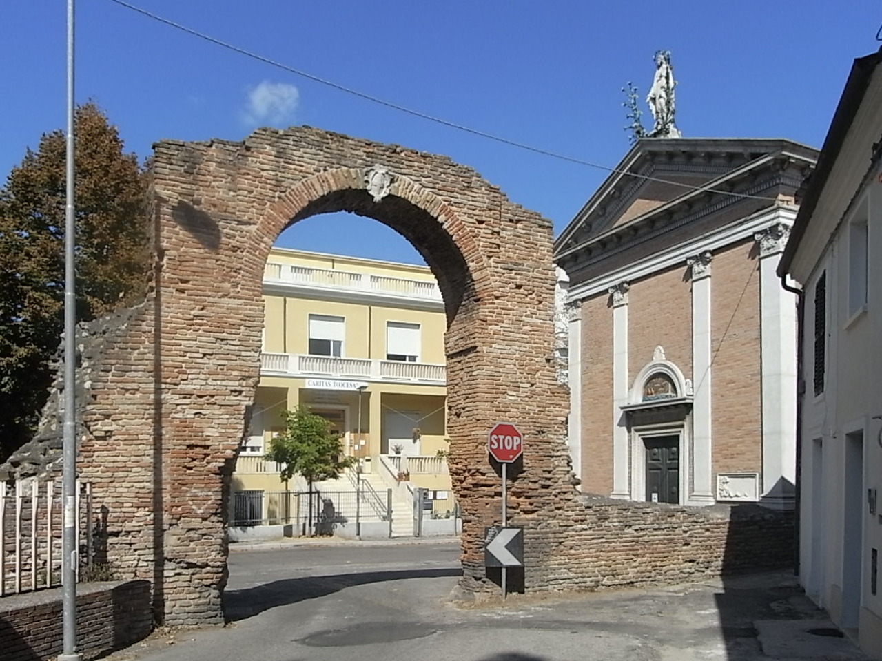 Torbogen in der Stadtmauer von Rimini - San Giuliano Mare. Rechts die Kirche Madonna della Scala.